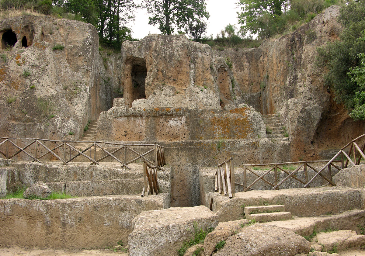 Tomba Ildebranda nella Necropoli di Sovana, Tuscany, Italy.